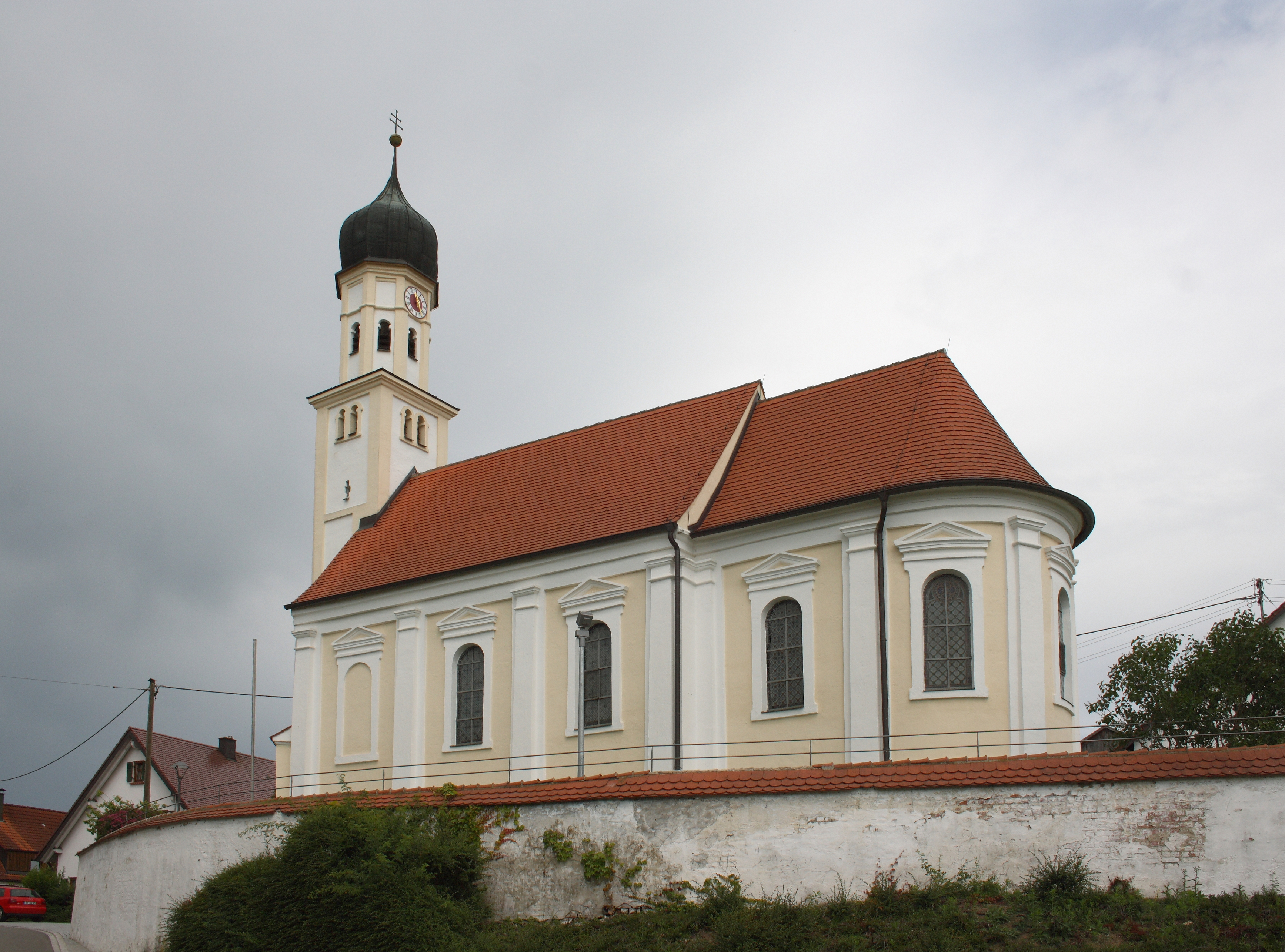 Katholische Filialkirche St. Georg in Unterschöneberg, einem Ortsteil von Altenmünster im Landkreis Augsburg (Bayern), um 1620 errichtet